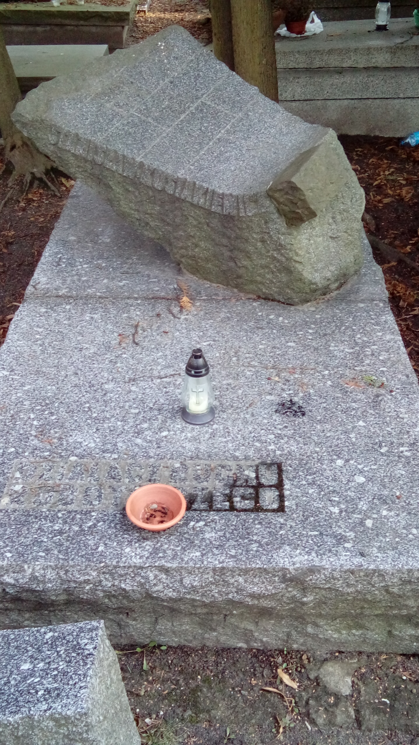 Grób Stanisława Kosiakiewicza na Cmentarzu Wojskowym na Powązkkach